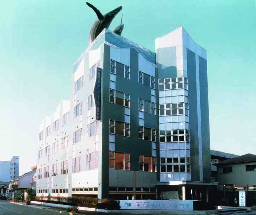 （東京スポーツ・レクリエーション専門学校の外観写真）